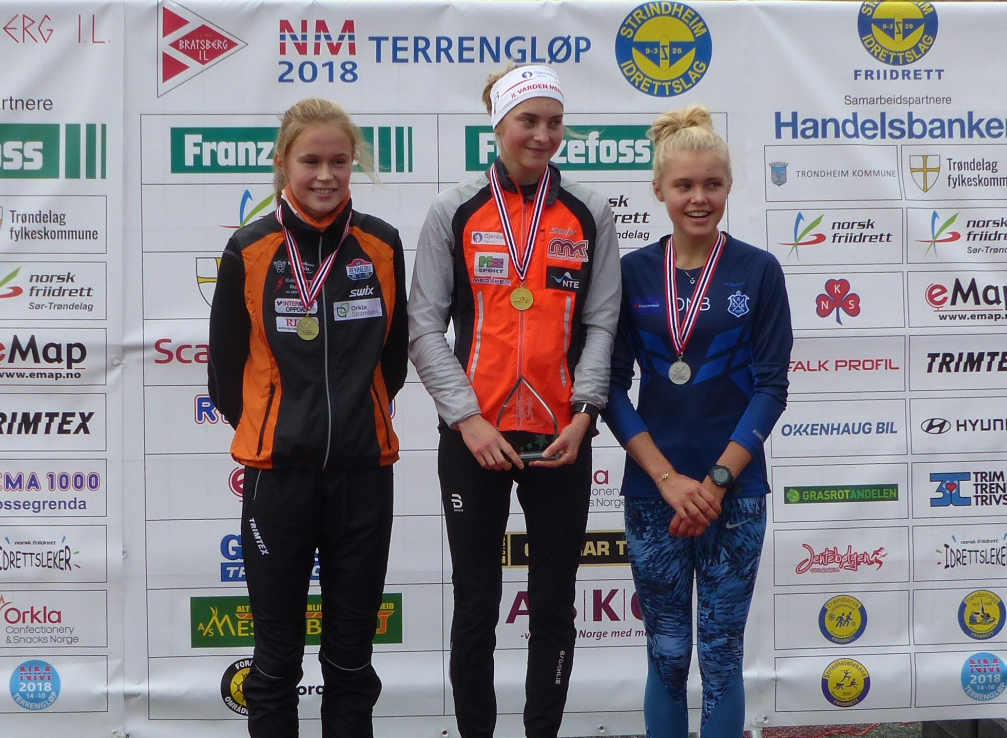 NM i terrengløp, lang løype, Bratsberg - Trondheim, 2018. Seierspallen for kvinner junior.